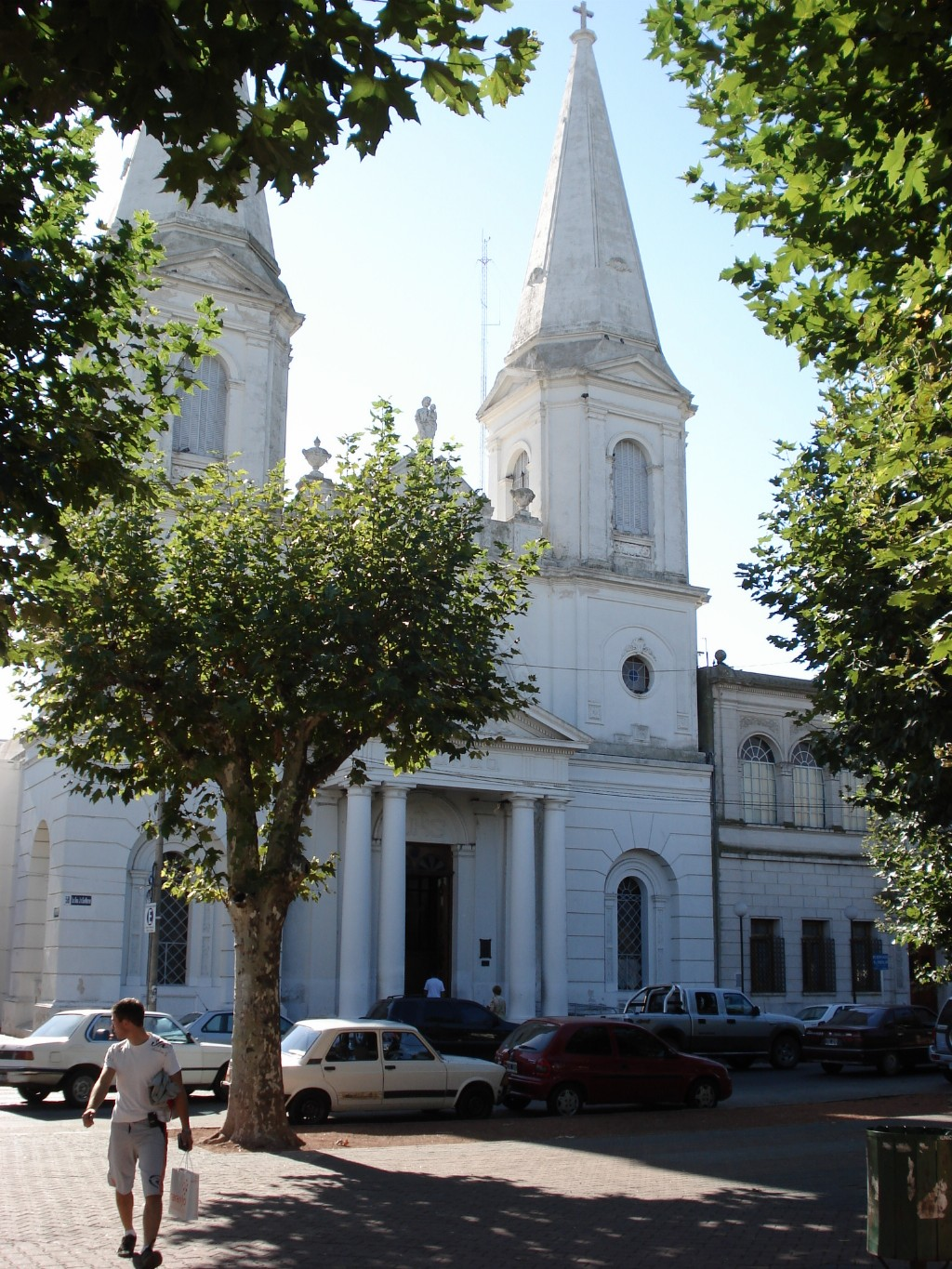 Iglesia San José ubicada en la Ciudad de Olavarría en la Provincia de Buenos Aires, Argentina. Inaugurada en el año 1898.